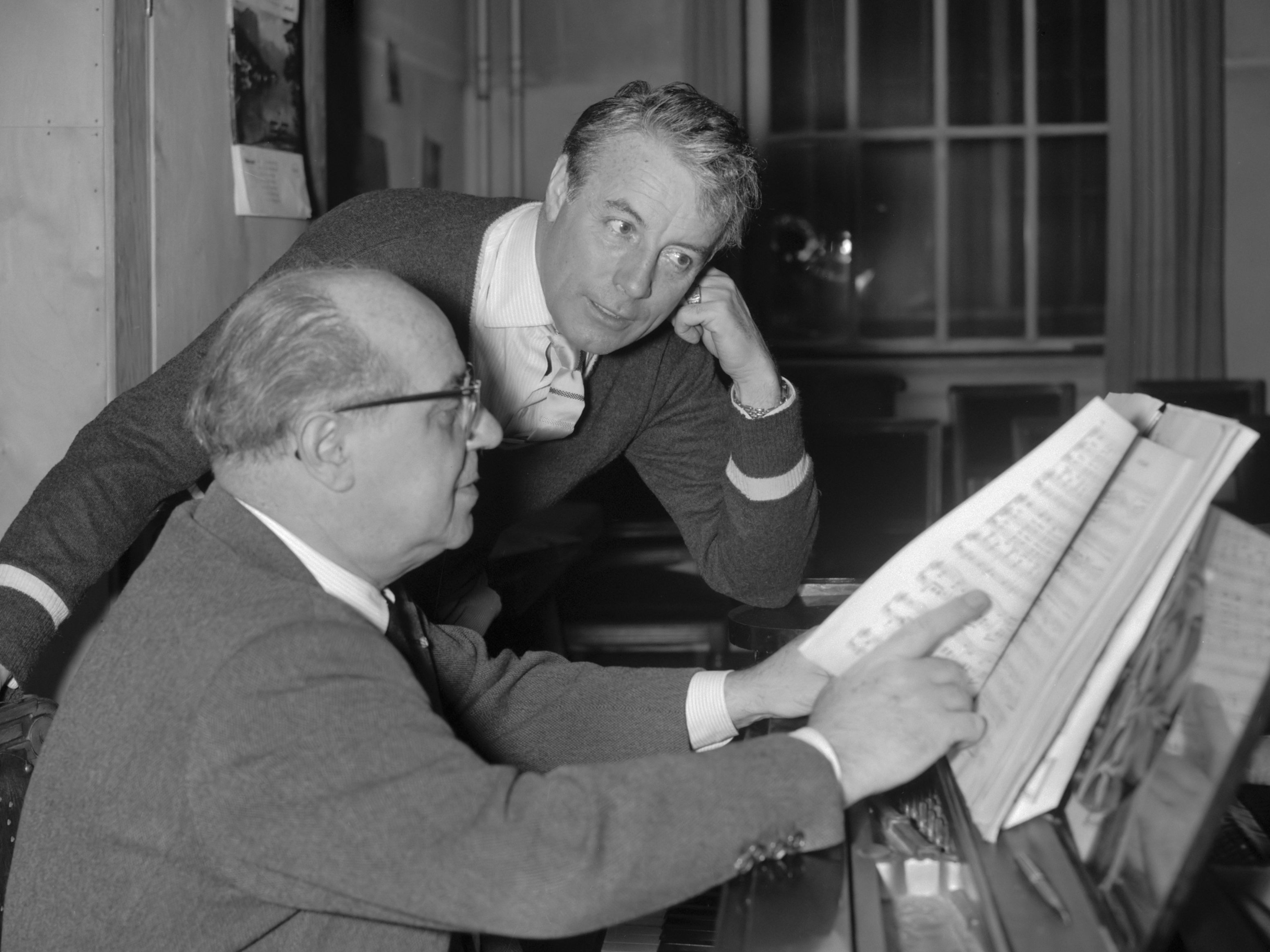 Nederlands-Weense acteur [en zanger] Johan Heesters in Nederland. Johan Heesters tijdens de repetitie met prof. Anton Paulik voor de operette "Der Bettelstudent" 16 februari 1960